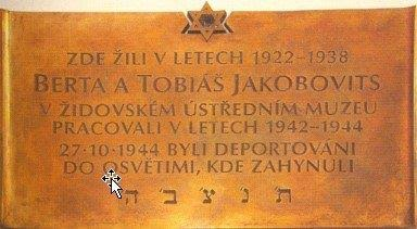 Pamětní deska, Berta a Tobiáš Jakobovits, Praha 1-Josefov, Jáchymova 63/3, bývalá židovská škola, později muzeum, na chodbě ve 2. patře.